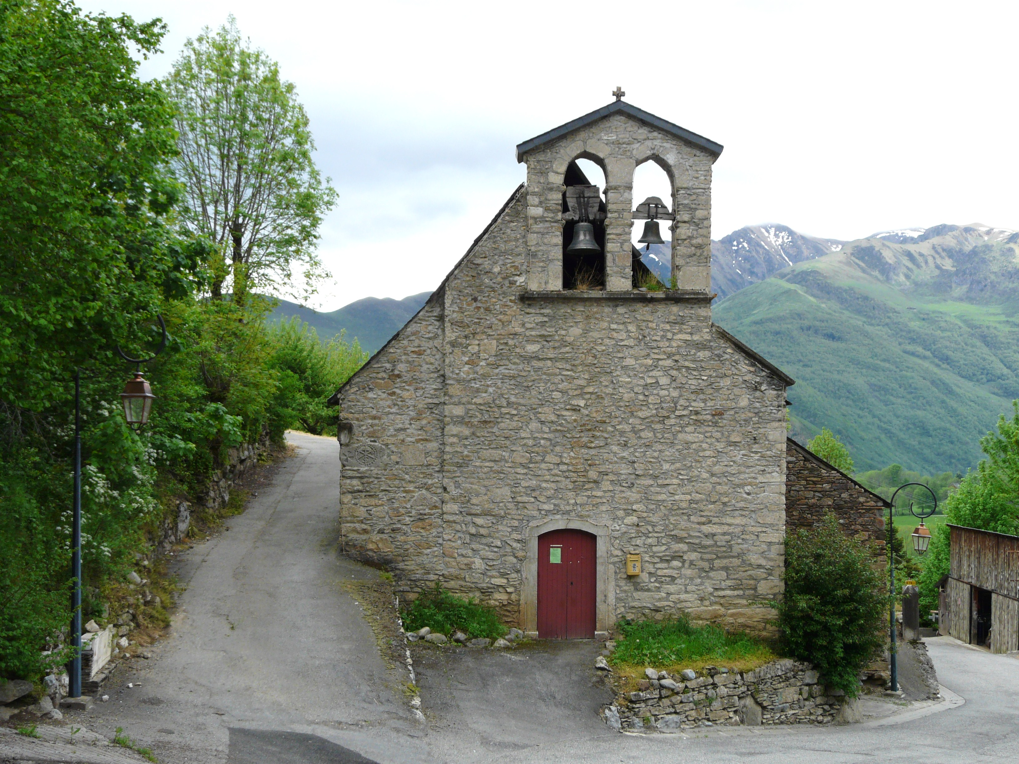 Le clocher-mur de l'église Saint-Simplice, Poubeau, Haute-Garonne, France.